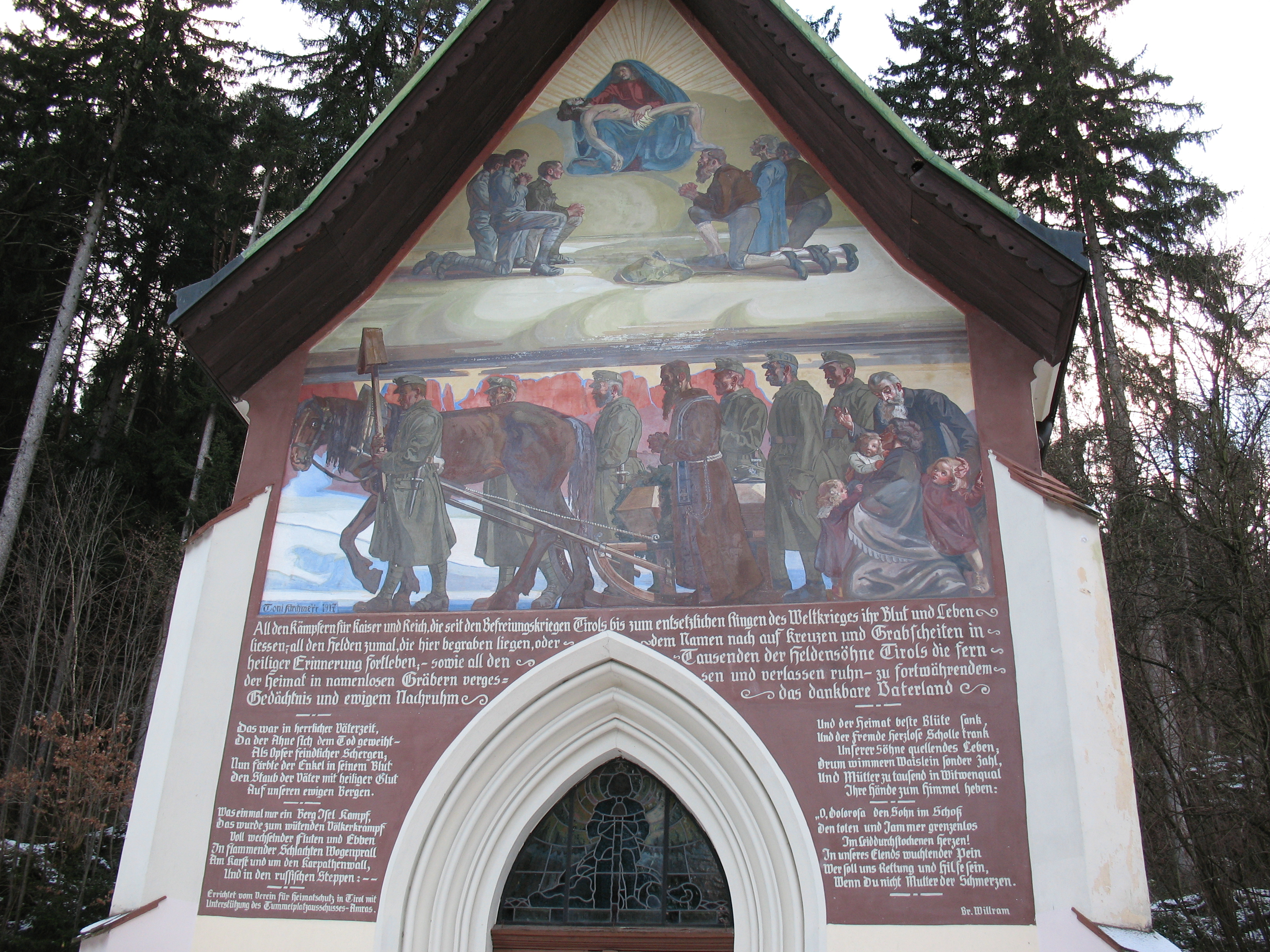 Kreuzkapelle (Jubiläumskapelle bzw. Kreuzwegkapelle)